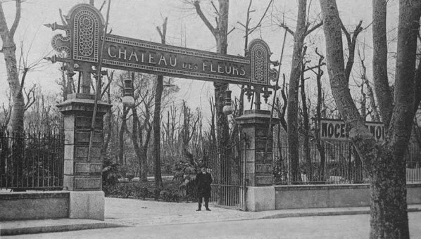 Chateau des fleurs au niveau du rond point du prado, avant la construction du boulevard Michelet (anciennement nommé boulevard de mazargues)